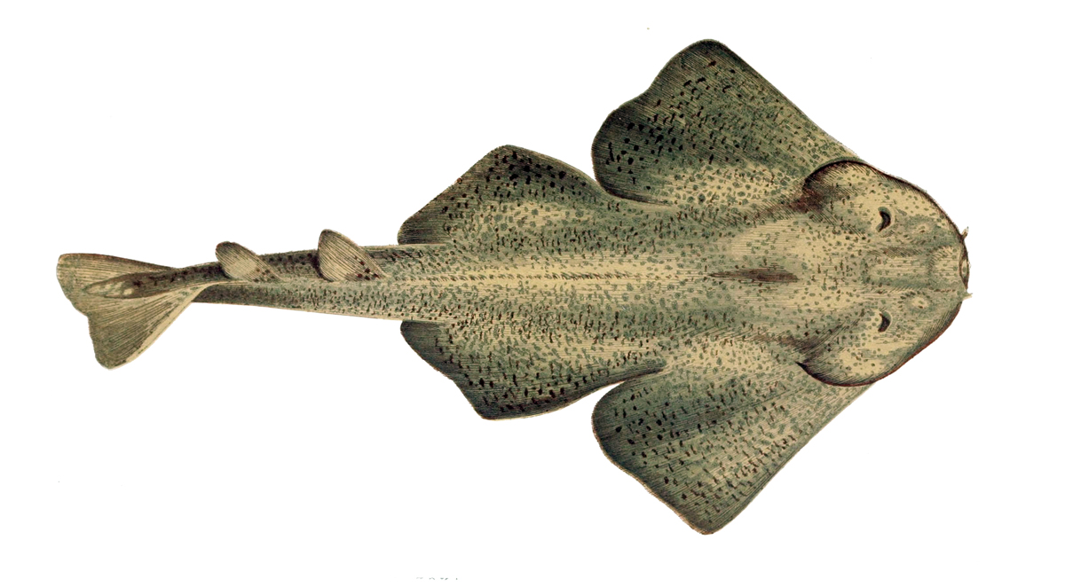 Squatina squatina